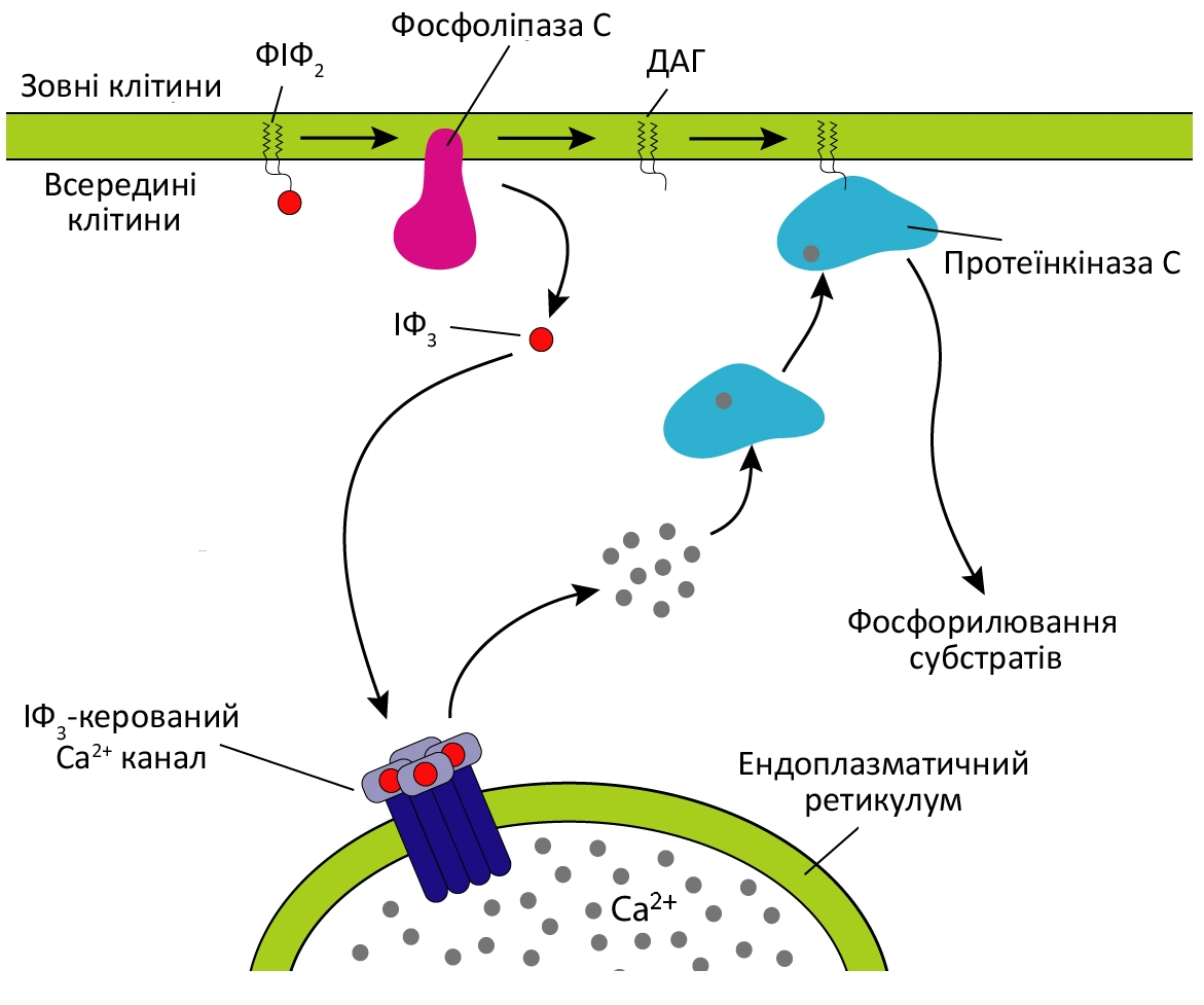 Сигнальний шлях ІФ3/ДАГ: Фосфоліпаза С розщеплює ФІФ2 (фосфатидилінозитол-4,5-біфосфат) на ІФ3 (інозитол-1,4,5-трифосфат) та ДАГ (диацилгліцерол). ІФ3 відкриває кальцієві канали в ендоплазматичному ретикулумі, а ДАГ разом із іонами кальцію активує протеїнкіназу C, яка забезпечує фосфорилювання багатьох білків.